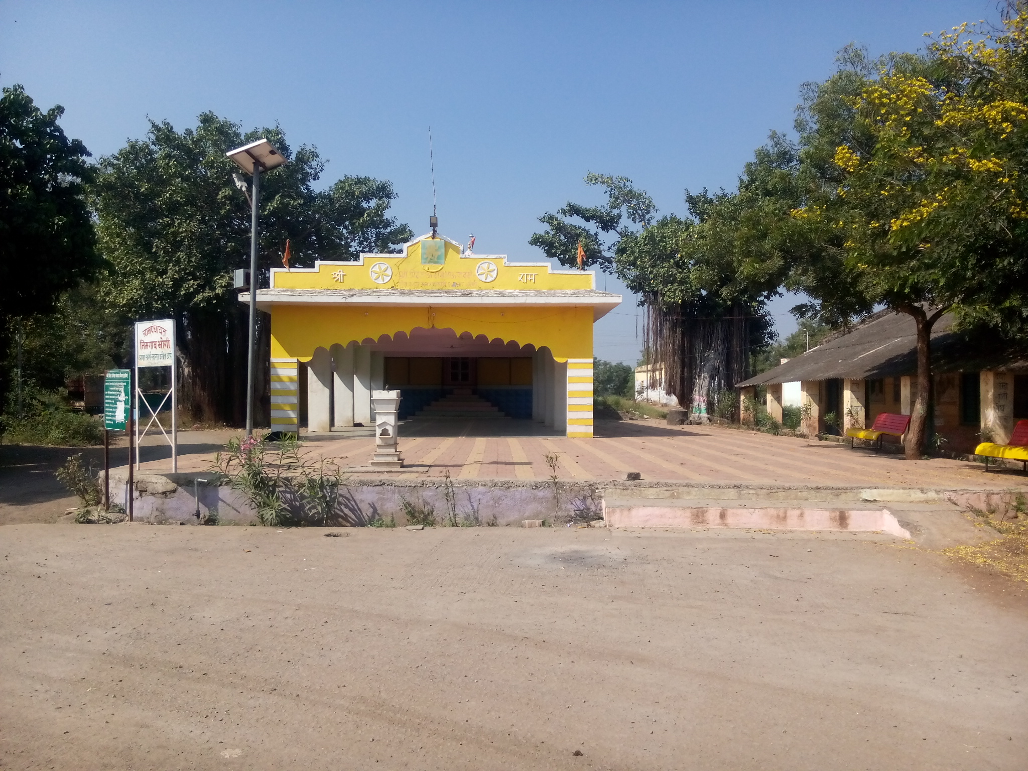 फोटो